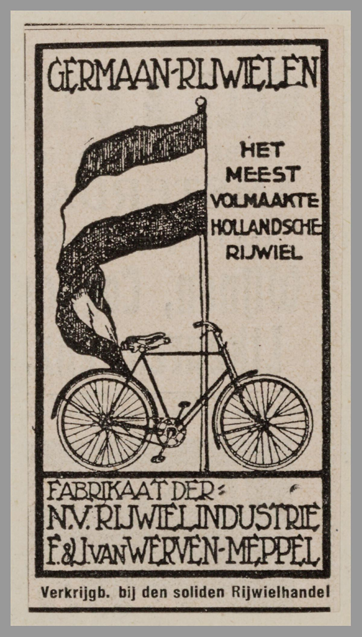 Affiche: Germaan. Opdrachtgever/adverteerder: Rijwielindustrie F. & J. van Werven. Meppel